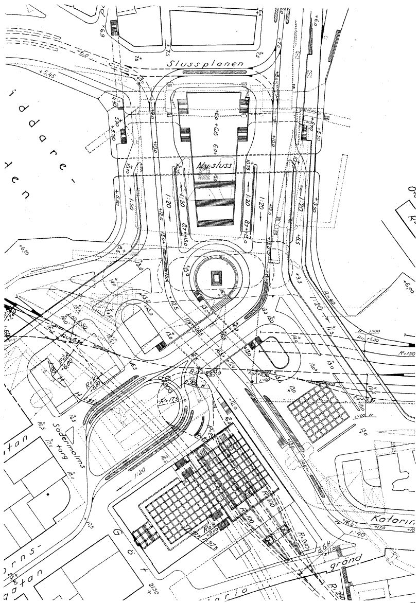 Huvudplan för reglering av slussområdet. Skala 1: 1 500.